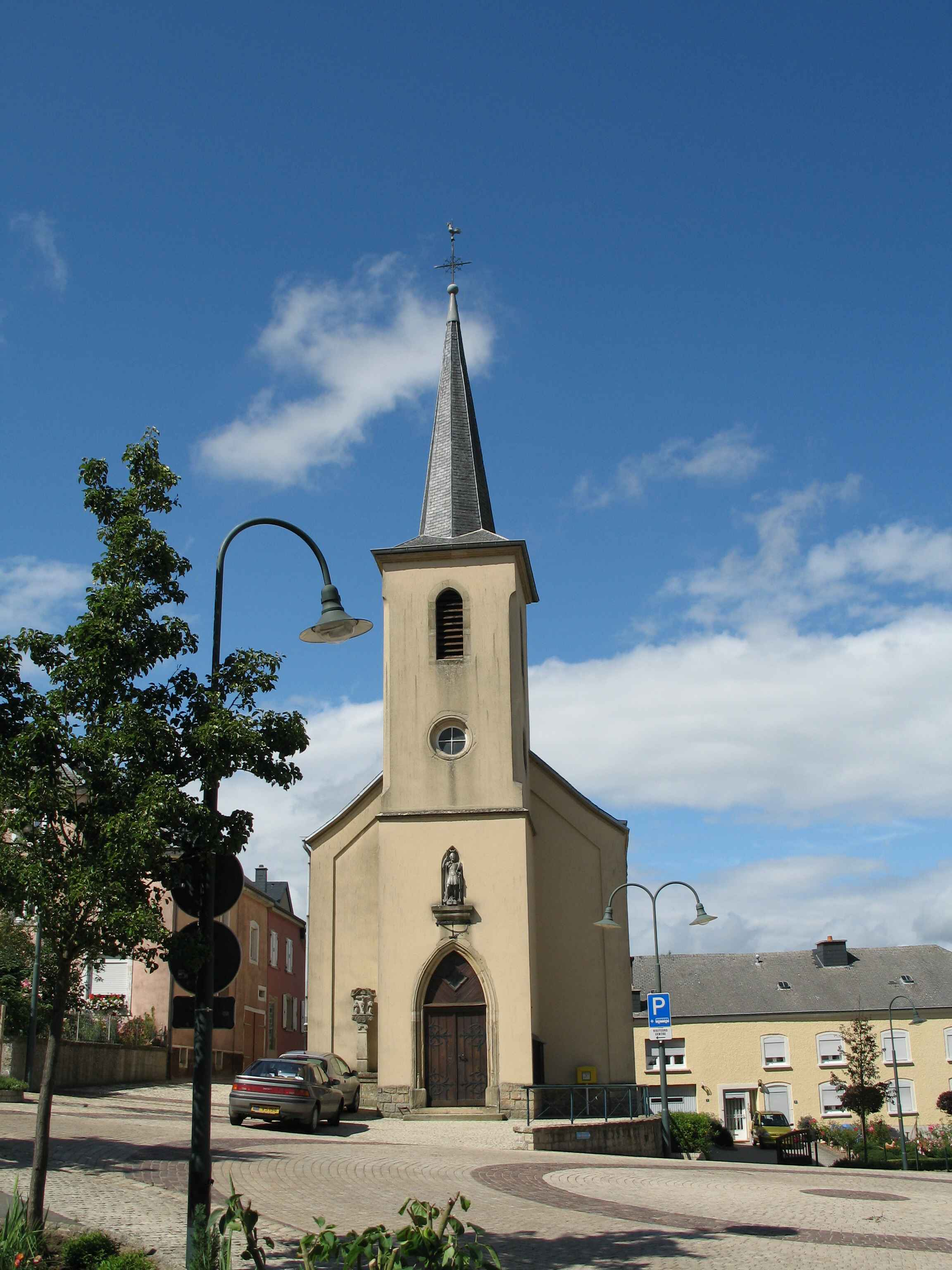 L'église de Hollenfels (Luxembourg)